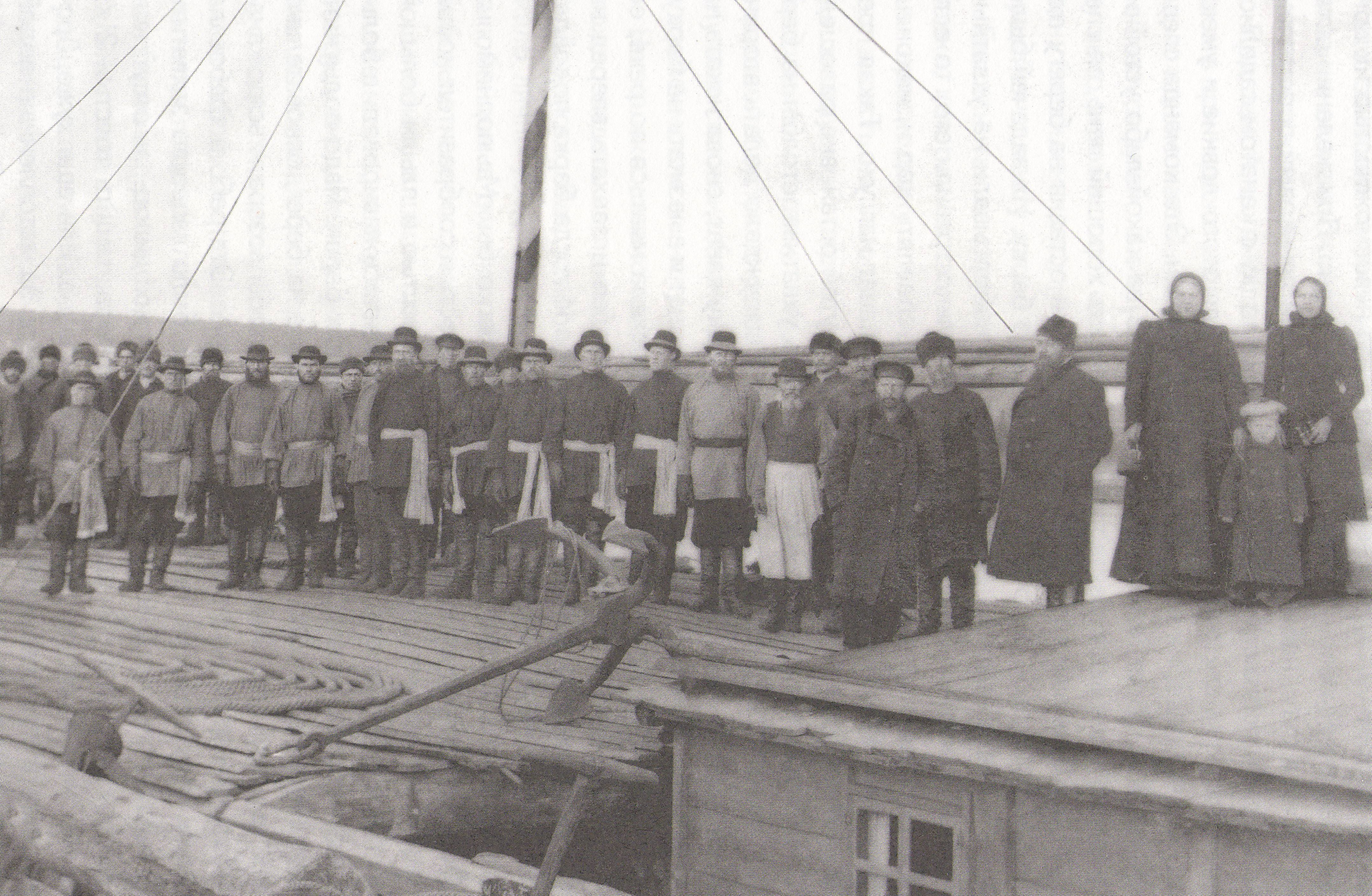 Филатов Н.Т. Сплавщики на барке-казенке, 1901